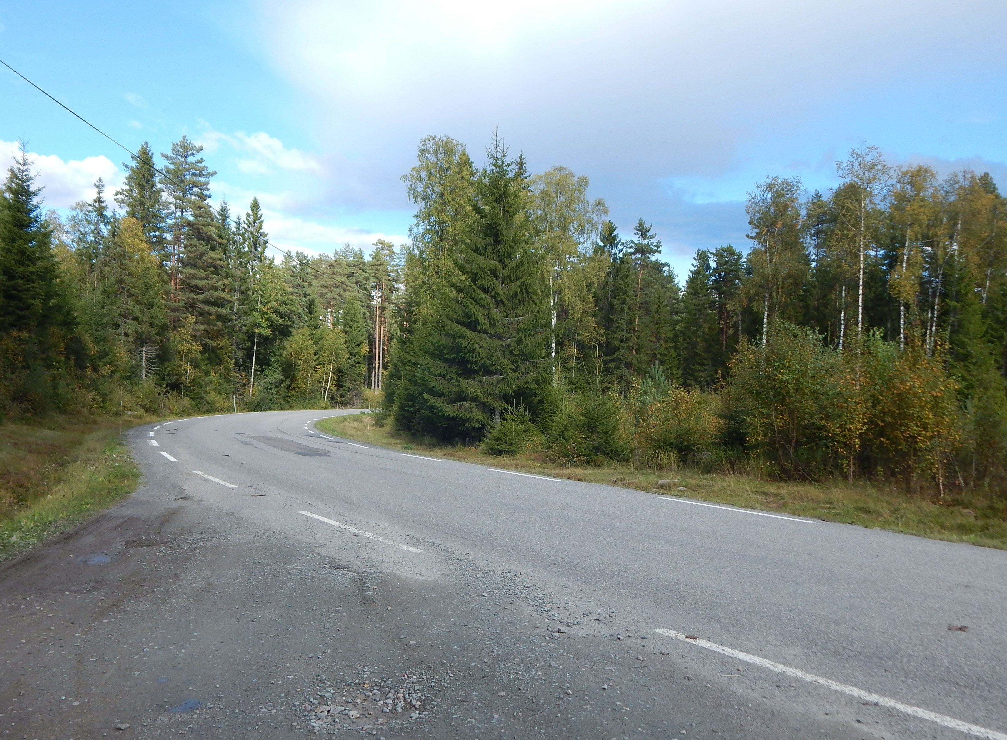 Rauhellavegen (fylkesvei 364) mellom Føskersjøen og Sigernessjøen